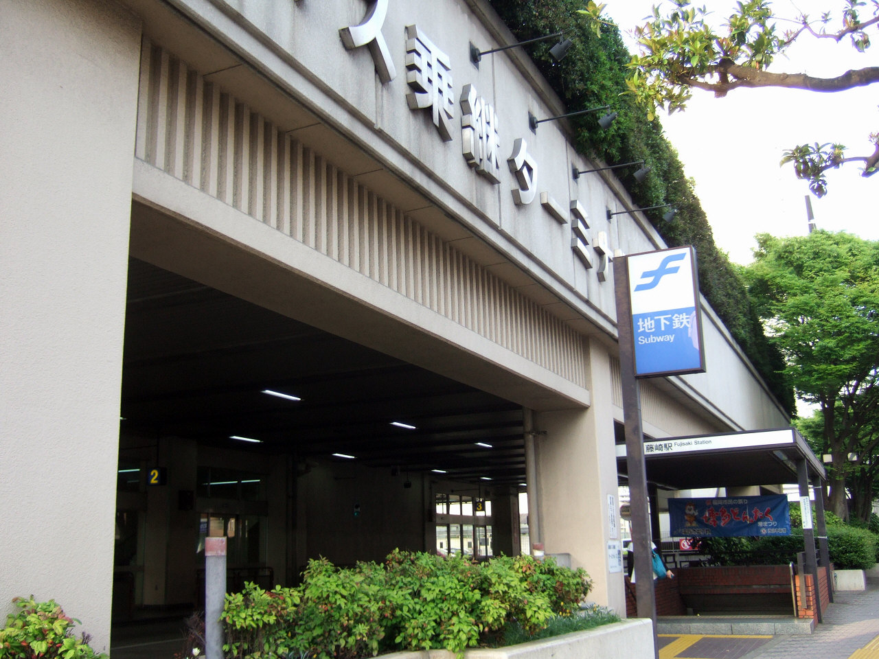 福岡市地下鉄藤崎駅（Fujisaki Station,Fukuoka City Subway）